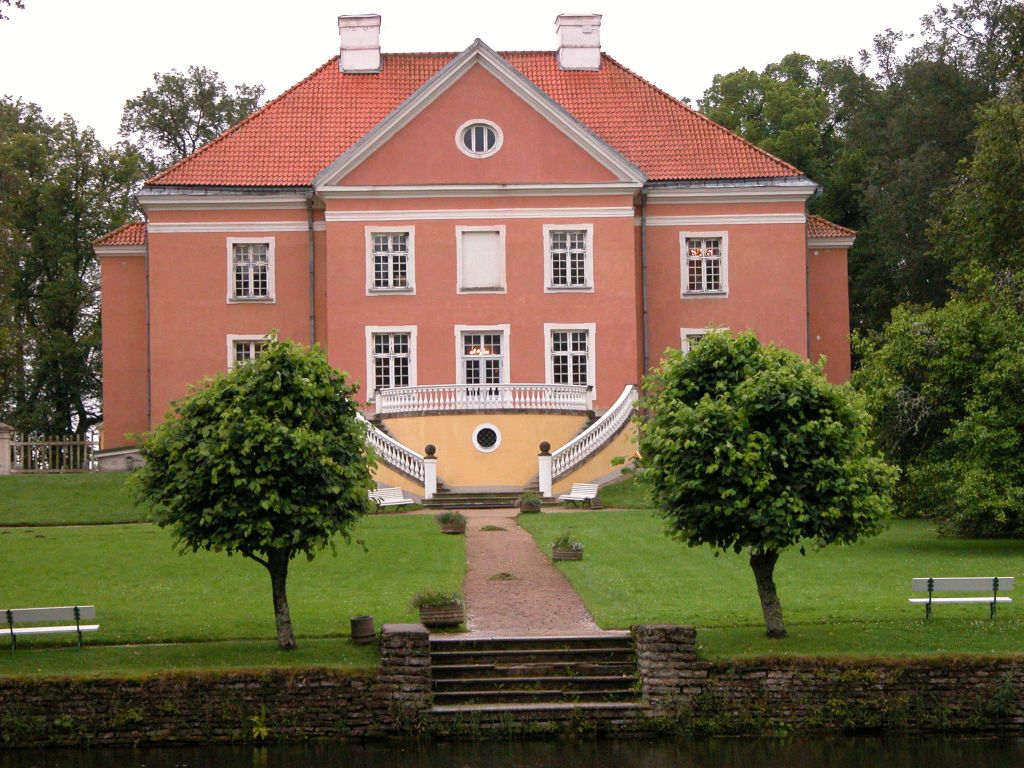 Palmse, Estland, Schloss (Rückansicht)